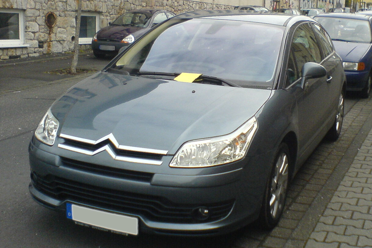 Citroën C4 Coupé